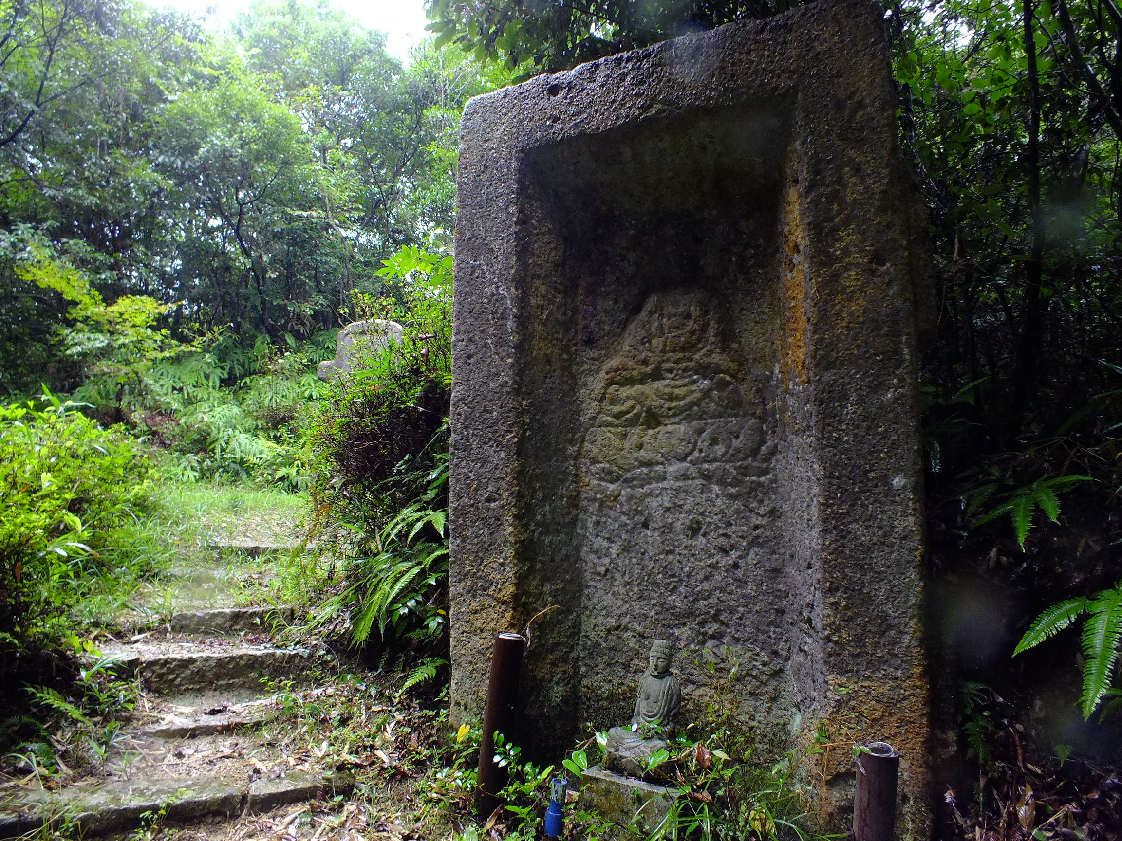 Yamabushi-Toge Sekibutsu 山伏峠石仏(兵庫県加西市玉野町)